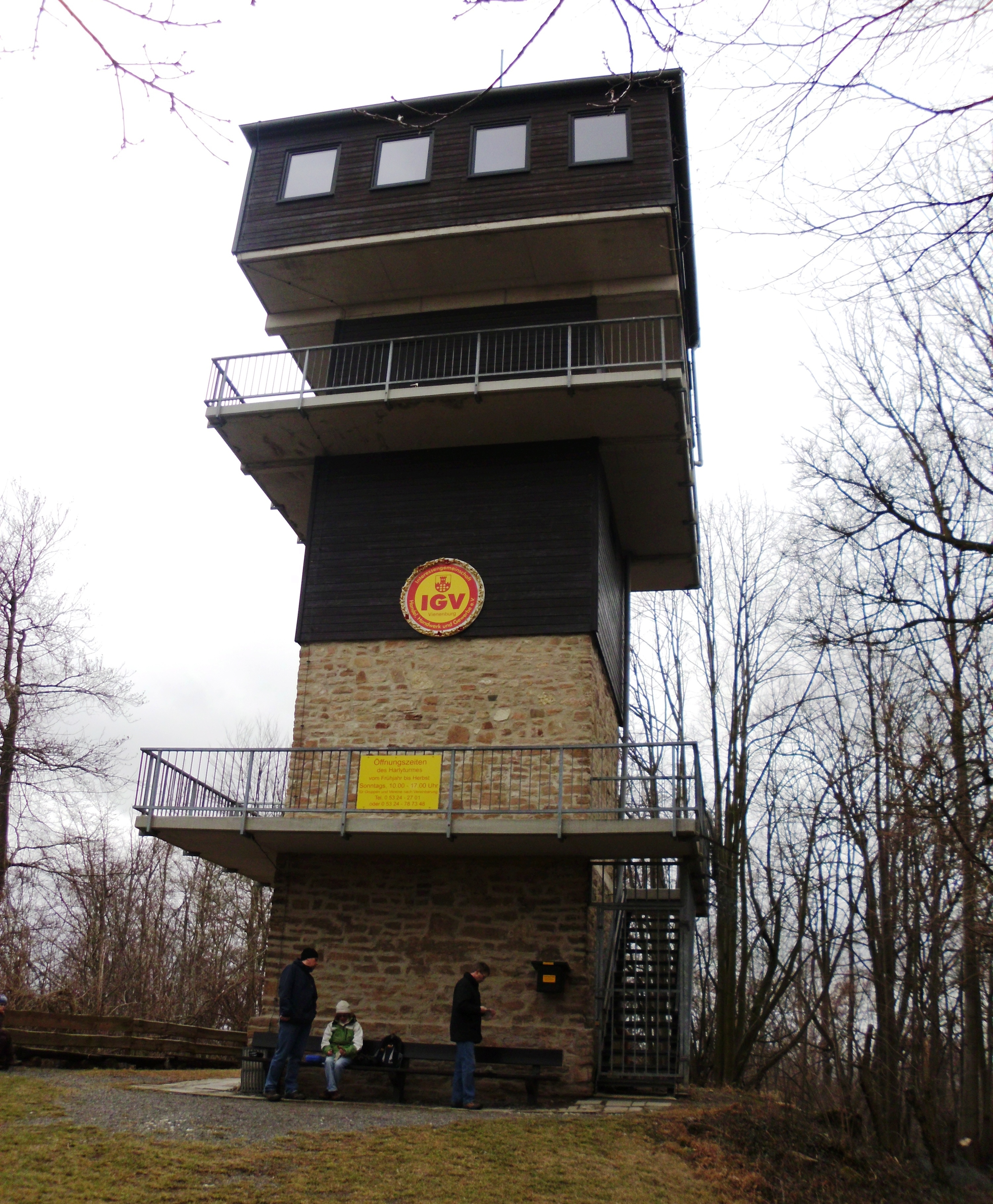 Harlyturm auf dem Harlyberg bei Wöltingerode, Stadt Goslar